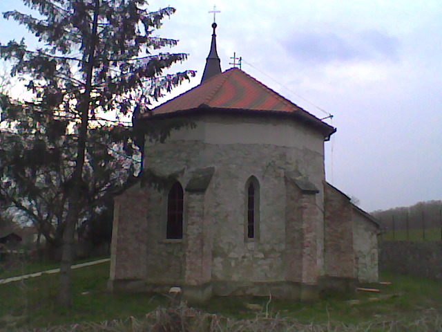 A tiszasülyi Szent László-templom